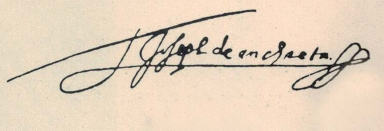 Assinatura do pensador e santo católico José de Anchieta.